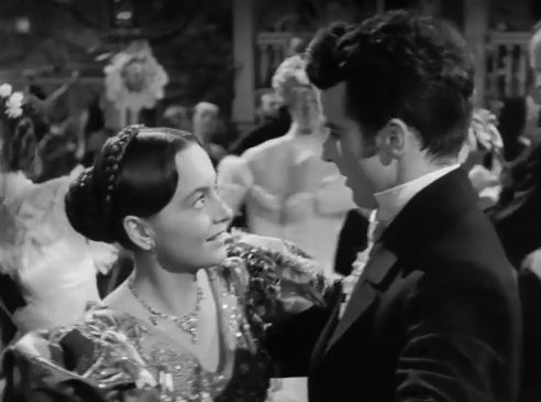 Olivia de Havilland et Montgomery Clift dans "L'héritière" de William Wyler (1949).